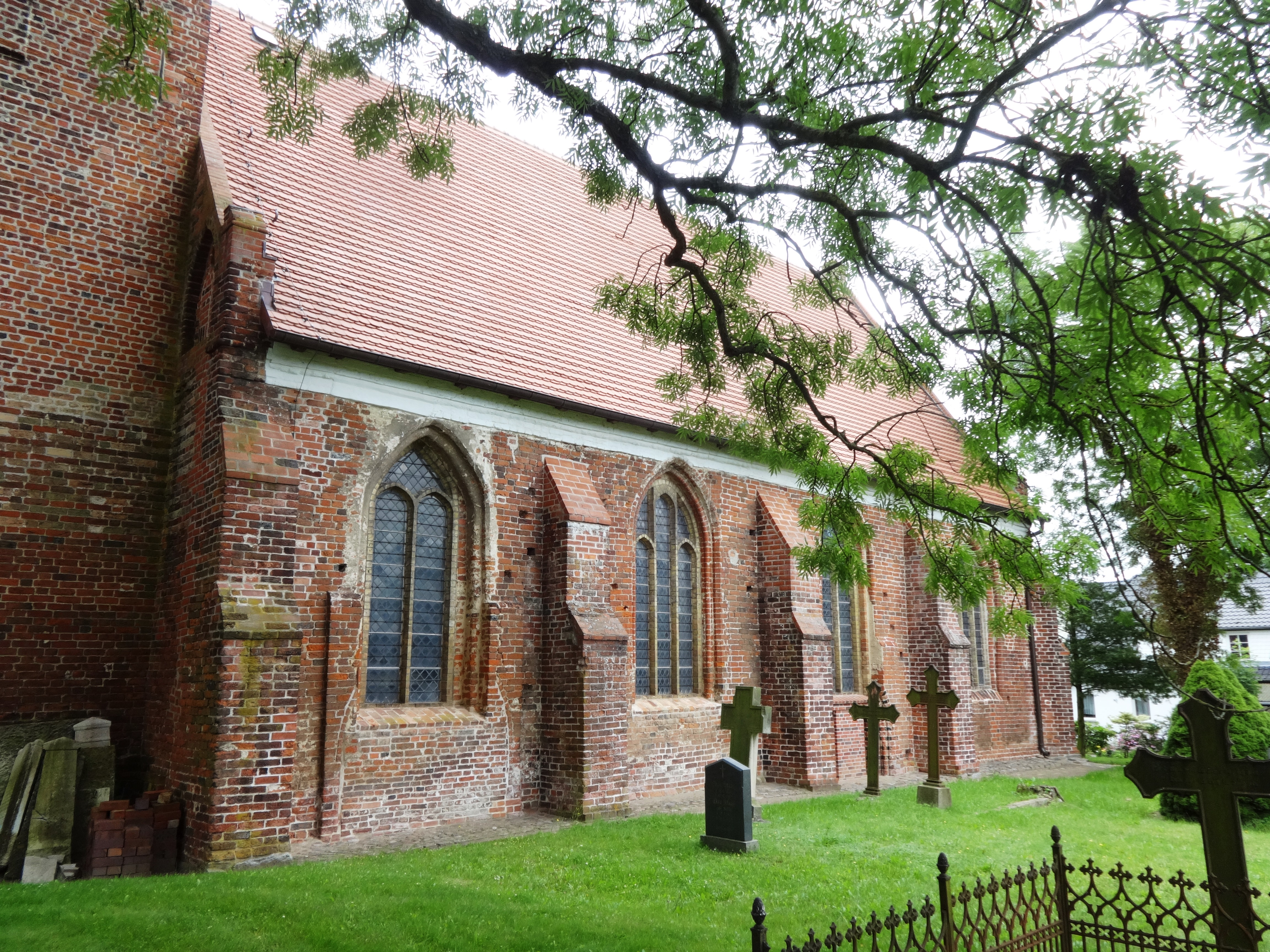 Die Kirche in Kröslin entstand vermutlich im 14. Jahrhundert. Im Innern befindet sich unter anderem ein Freester Fischerteppich.